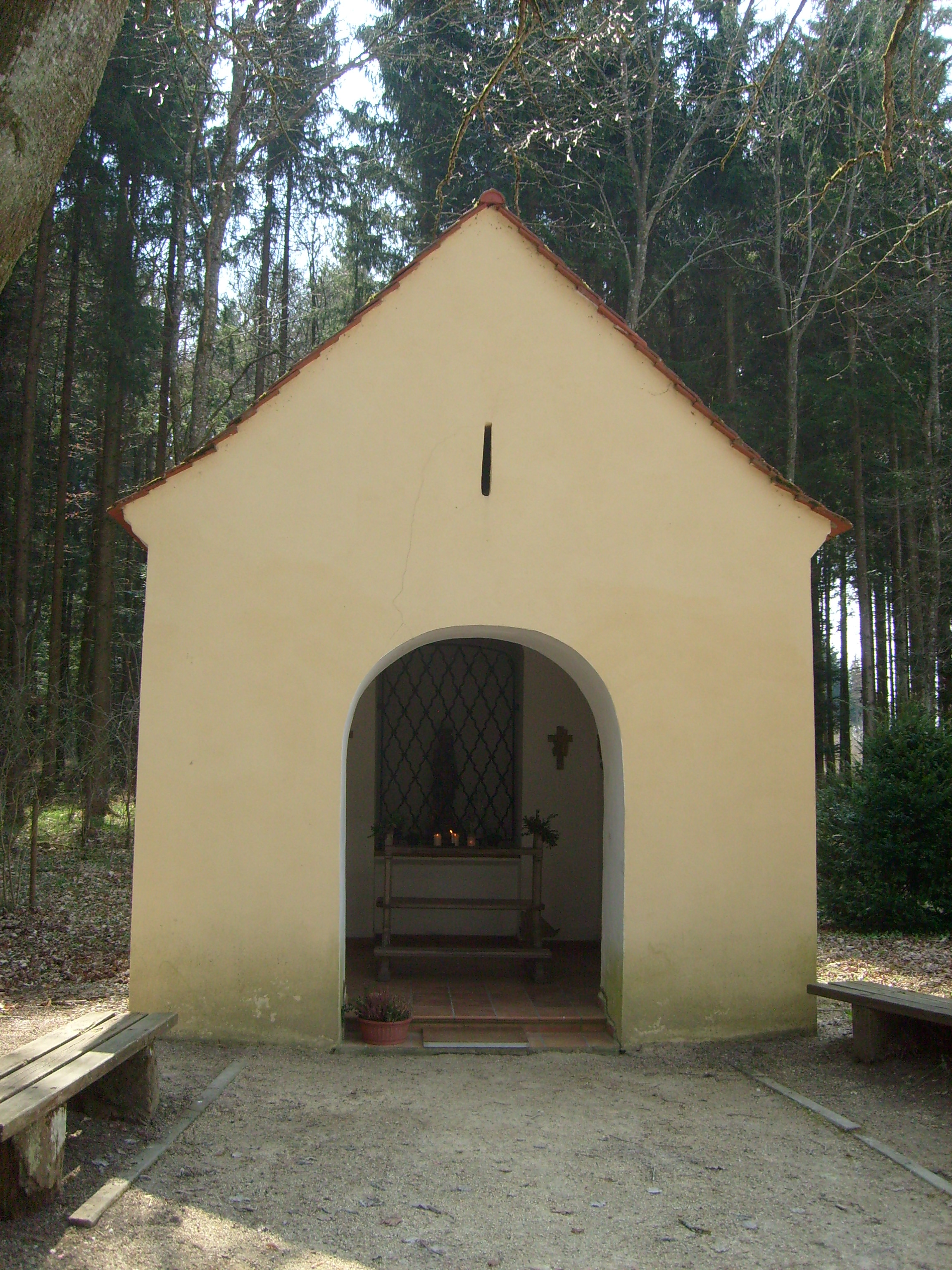 Die St. Verenakapelle in Engelswies, Gemeinde Inzigkofen, Landkreis Sigmaringen in Baden-Württemberg